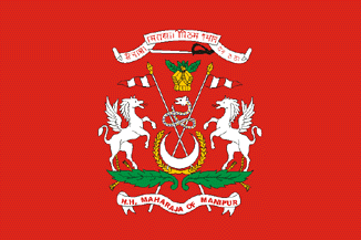 Bandera nacional de Manipur, roja Imagen realizada por J. Ollé Véase también: Wikipedia:Autorizaciones/Banderas de Jaume Ollé Categoría:Banderas (imagen)